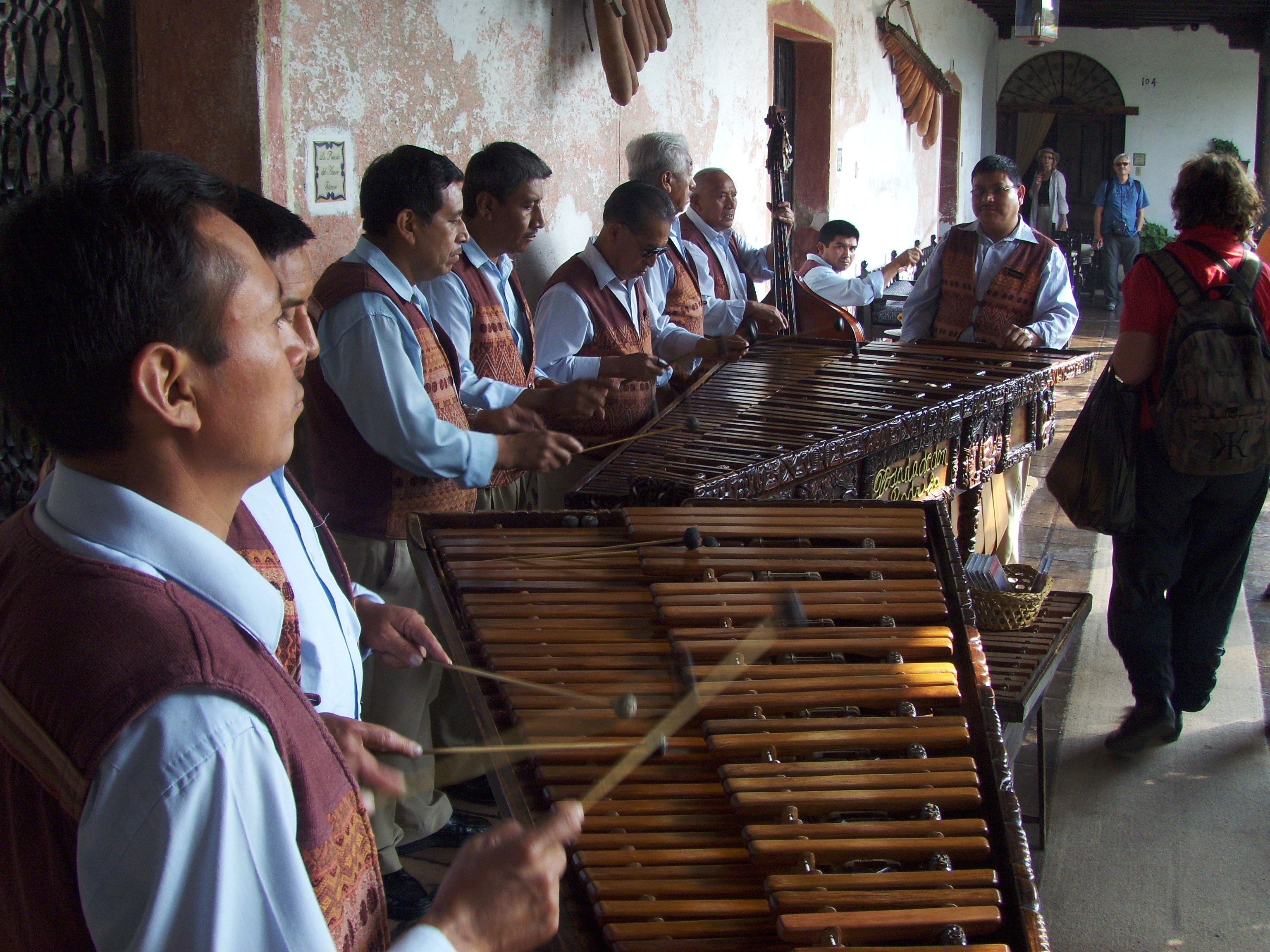 Tocadores de marimba en Antigua Guatemala